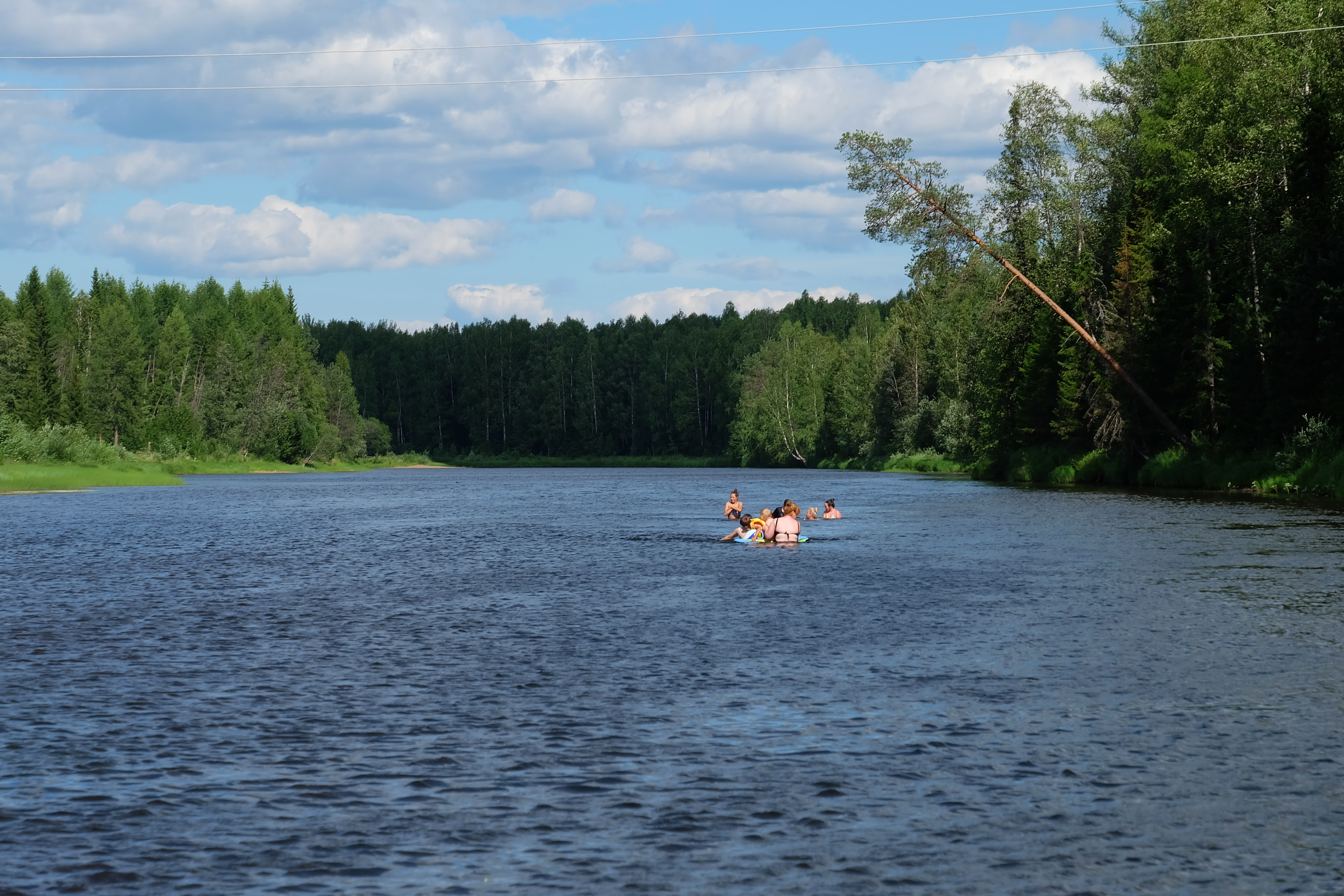 Река Сосьва близ посёлка Сосьва Североуральского городского округа.